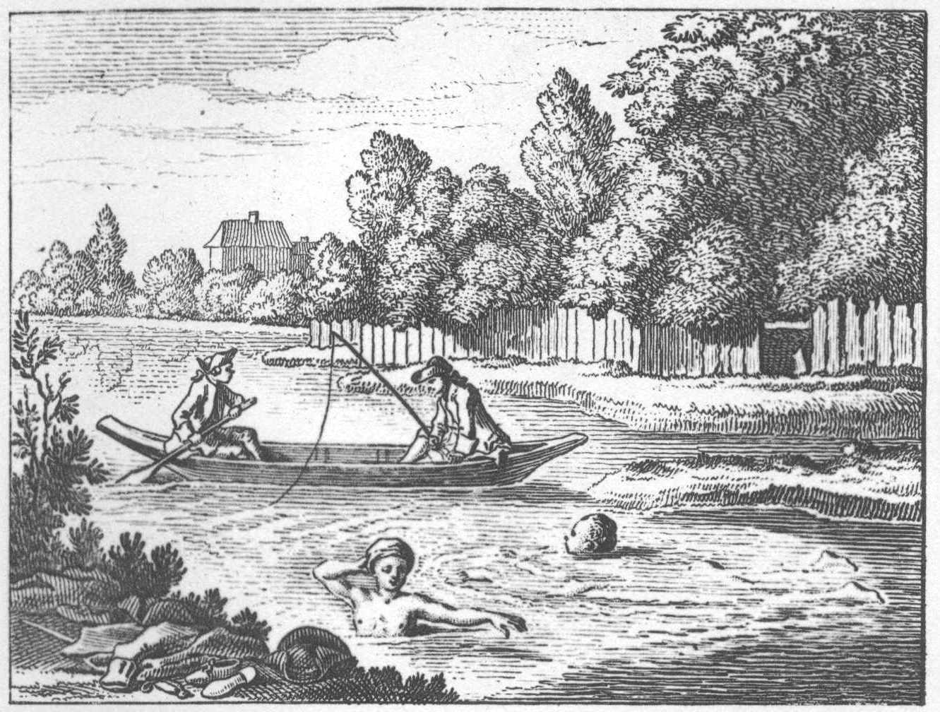 Vergnügungen der Jugend und des männlichen Alters. a) Der Kahn und das Fischangeln. Das Baden und das Schwimmen. (Beschreibung lt. Quelle)